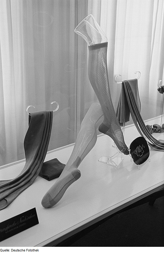 Original image description from the Deutsche Fotothek Damenstrümpfe aus Polymerfaser auf der Leipziger Herbstmesse 1954